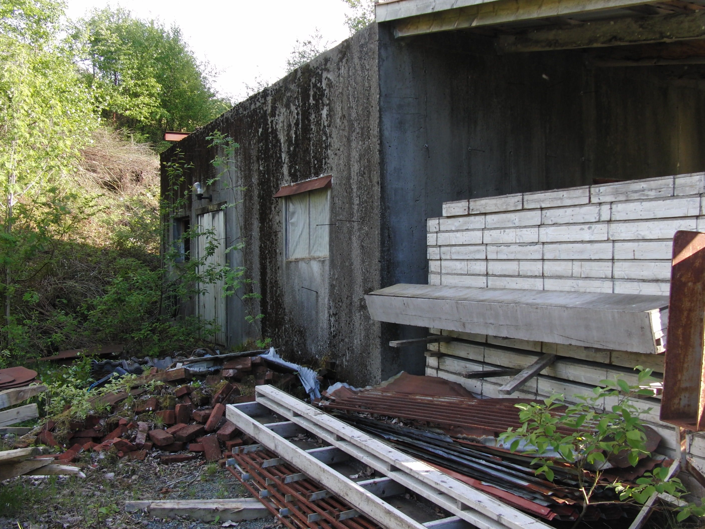 Grytten mikrokraftverk